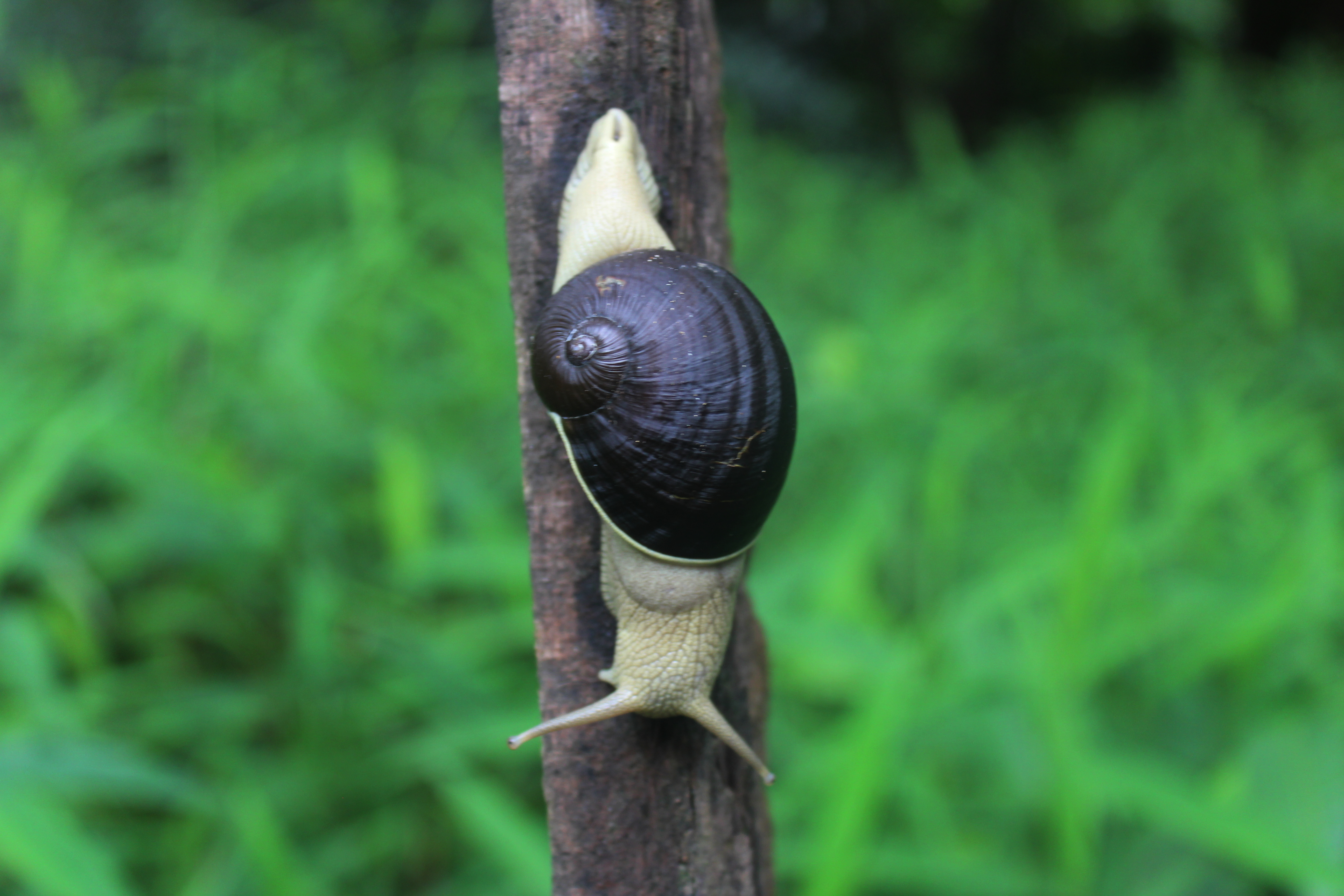 പശ്ചിമഘട്ടതദ്ദേശവാസിയായ ഒരു ഒച്ചാണ് ഇന്ദ്രല അമ്പ്യൂള(ശാസ്ത്രീയനാമം: Indrella ampulla). ഇന്ദ്രല ജനുസിലെ ഏക സ്പീഷിസാണിത്. വയനാട് ചുരത്തില്‍ നിന്ന് പകര്‍ത്തിയത്